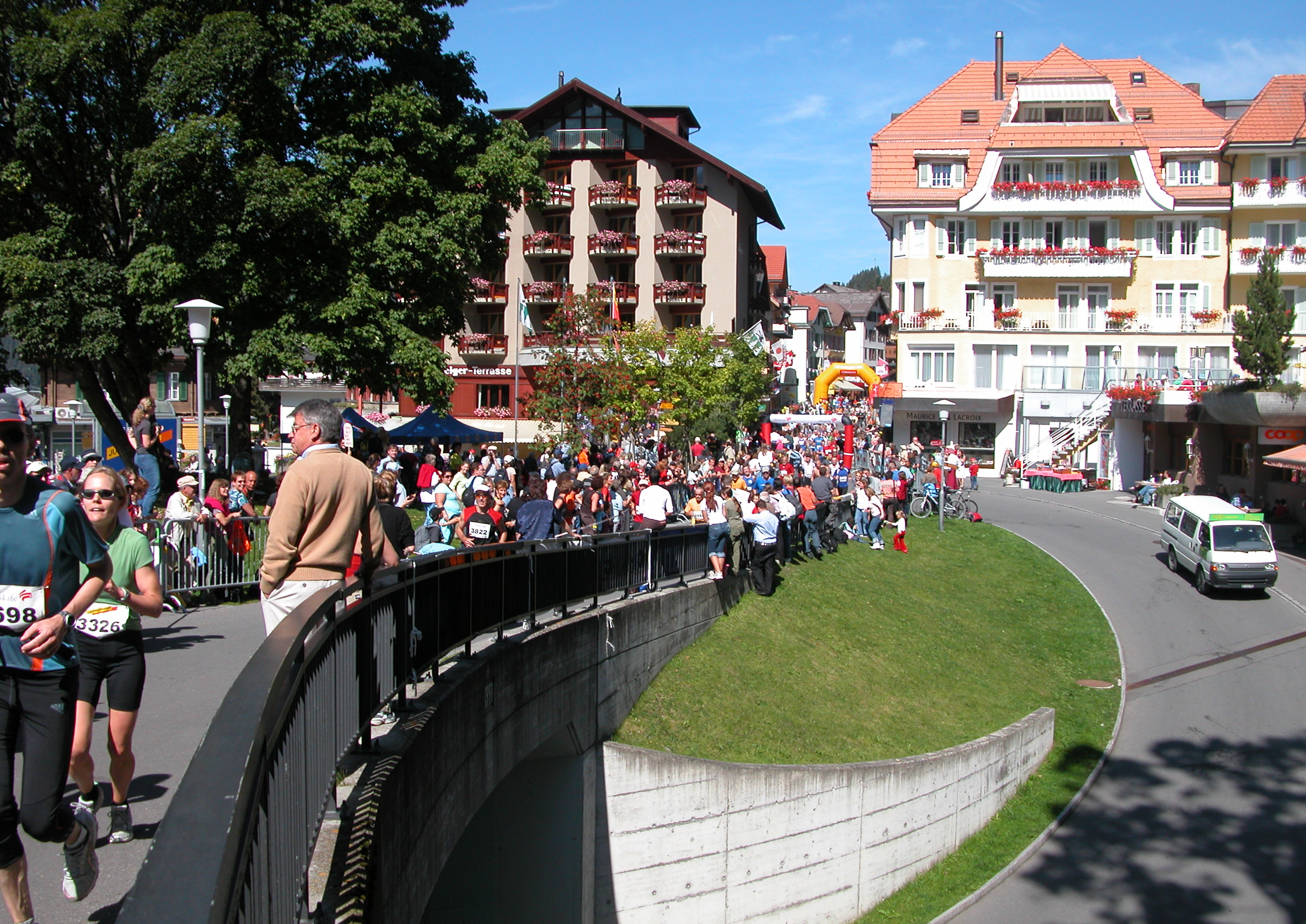 14. Jungfrau-Marathon am 09.09.2006